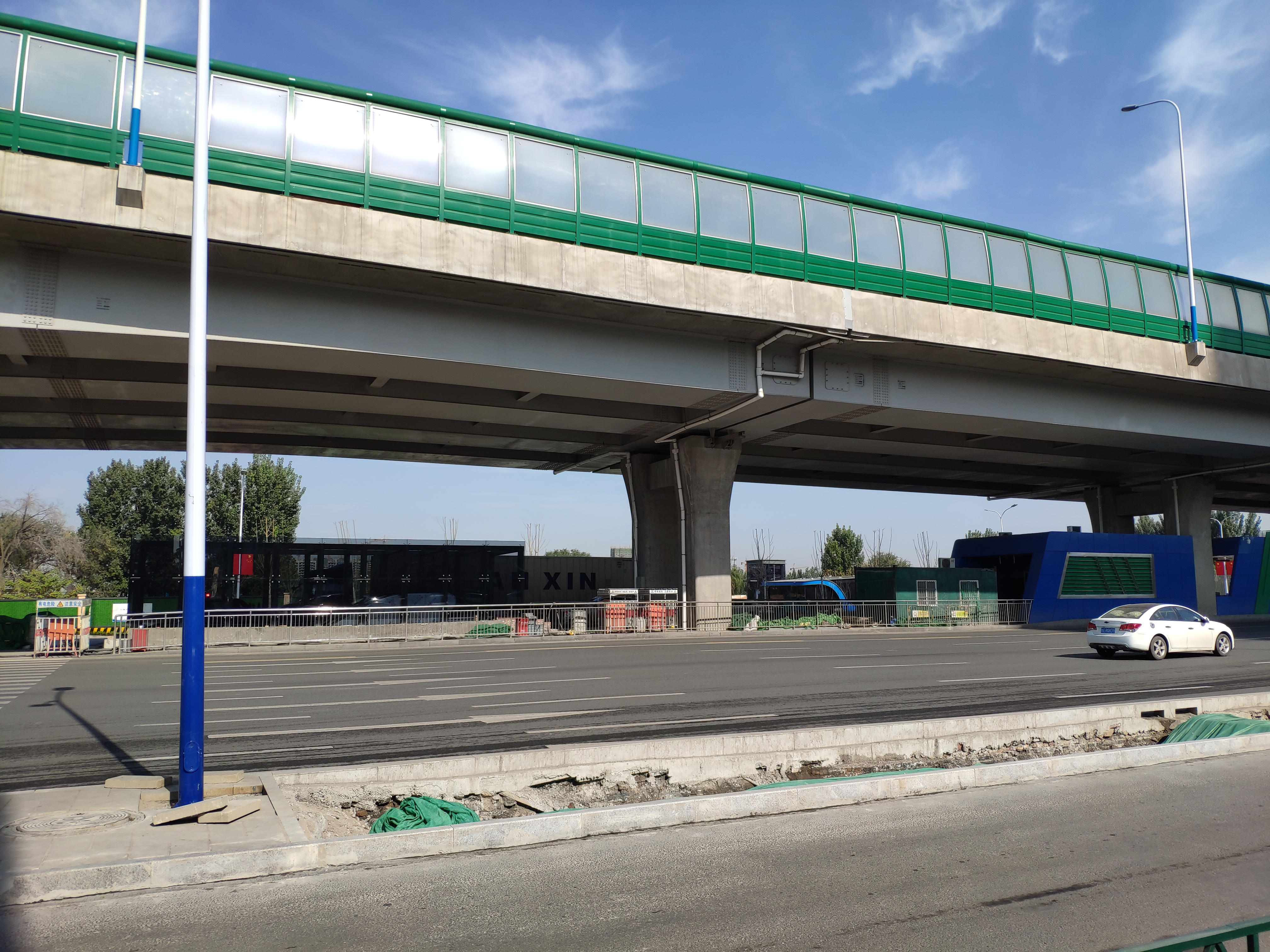 济南地铁3号线张马屯站出口与BRT出口，左侧为地铁出口，右侧为BRT出口